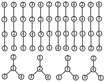 les 16 arbres étiquetés à 4 noeuds